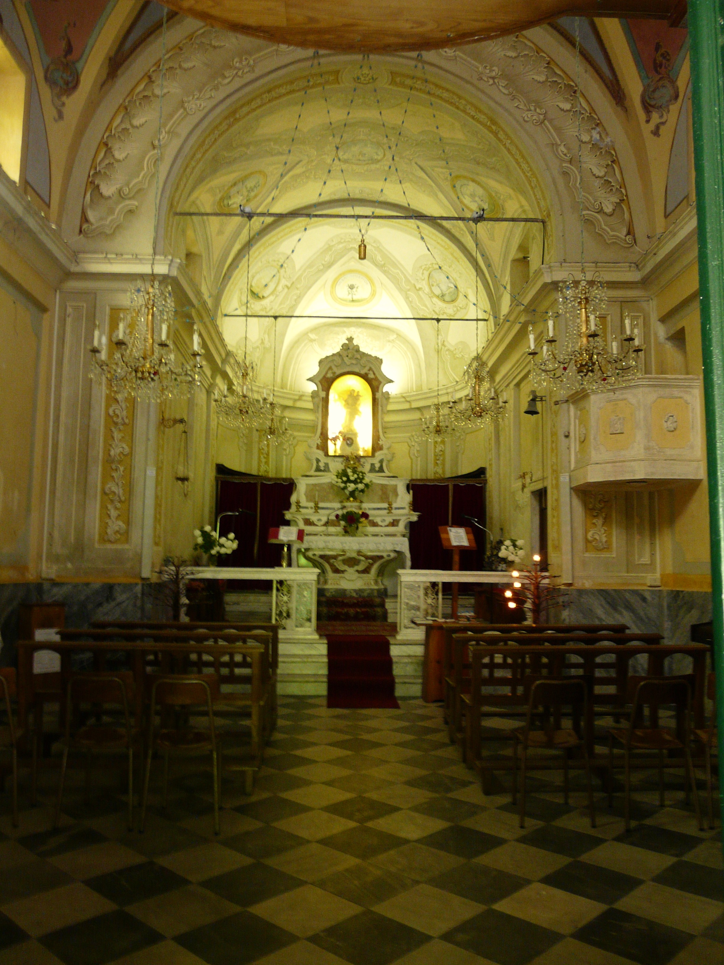 Santuario di Nostra Signora dell'Acqua, Valbrevenna, Liguria, Italia